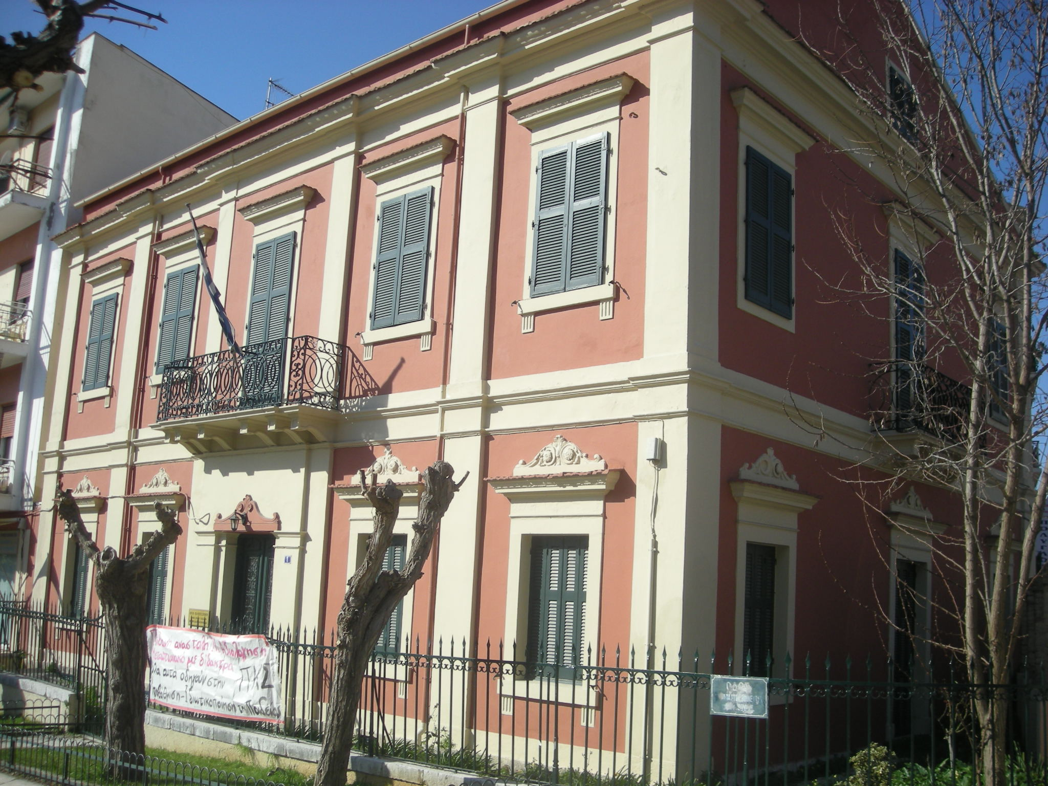 Instituto francés, uno de los edificios de la Universidad Jónica